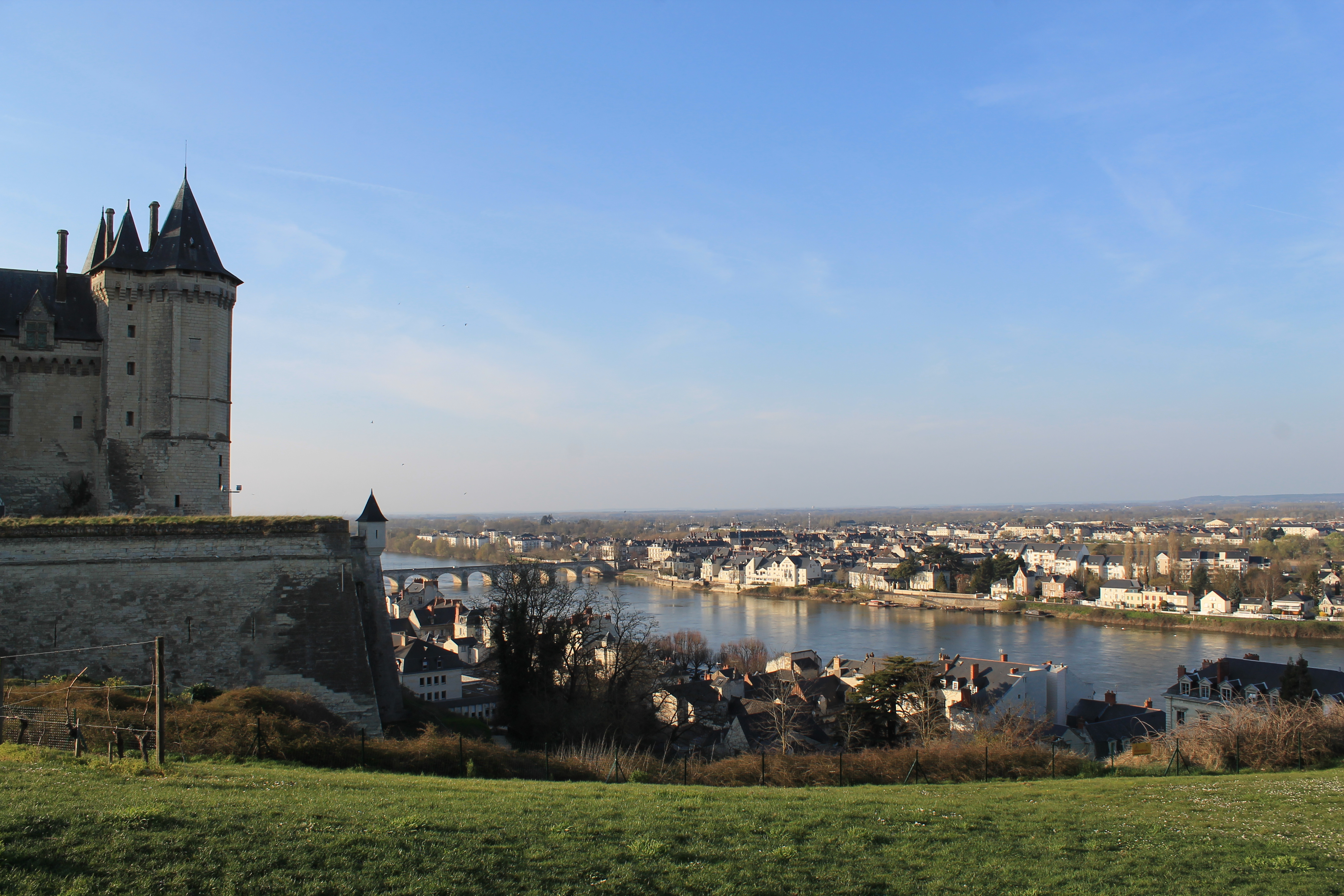 Saumur : le château et l'île Offard